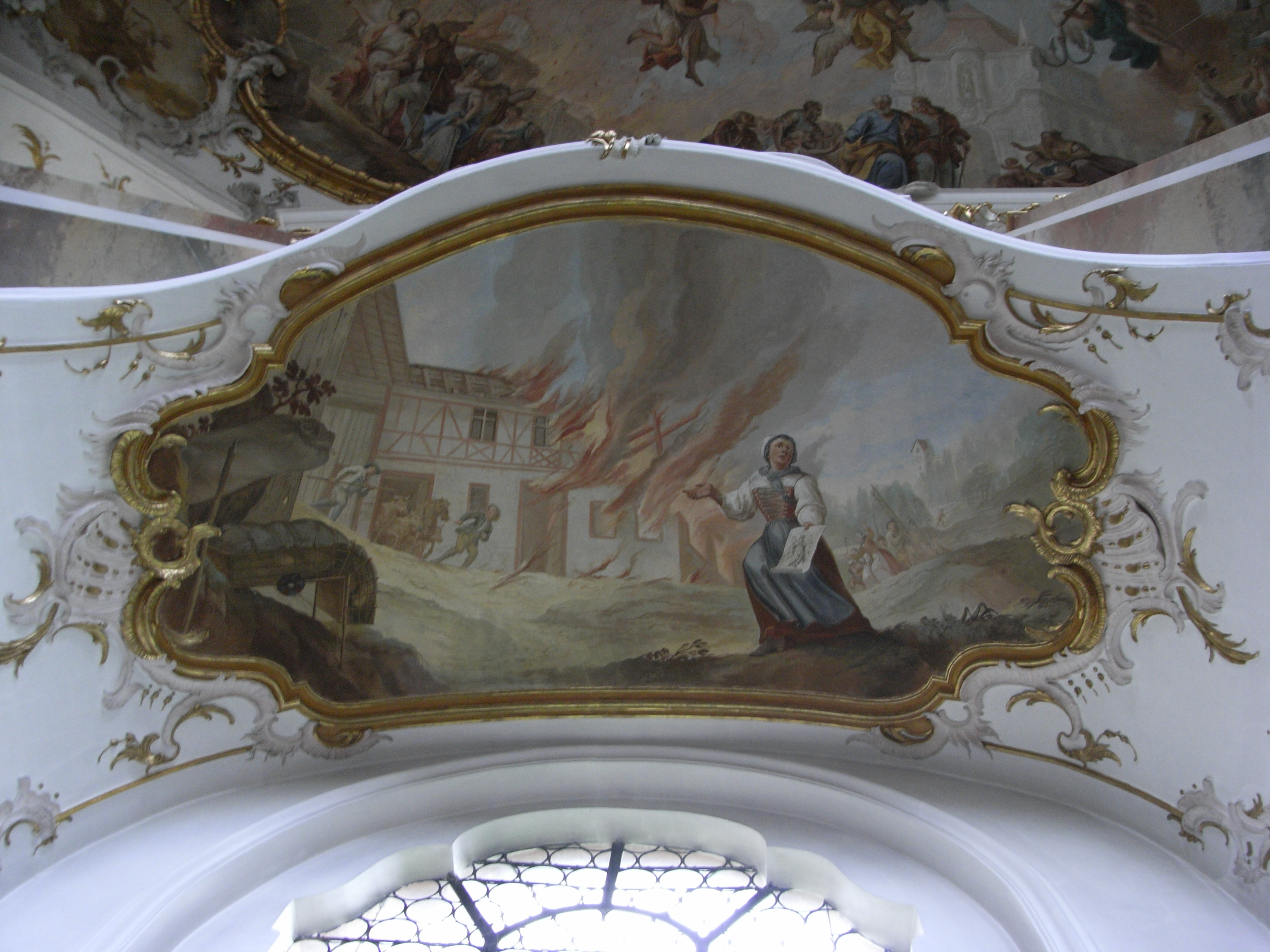 Wallfahrtskirche Maria Steinbach Deckenfresko im Nordschiff - Wundersame Hilfe bei einem Brand, aufgrund der Fürsprache der Gottesmutter Maria